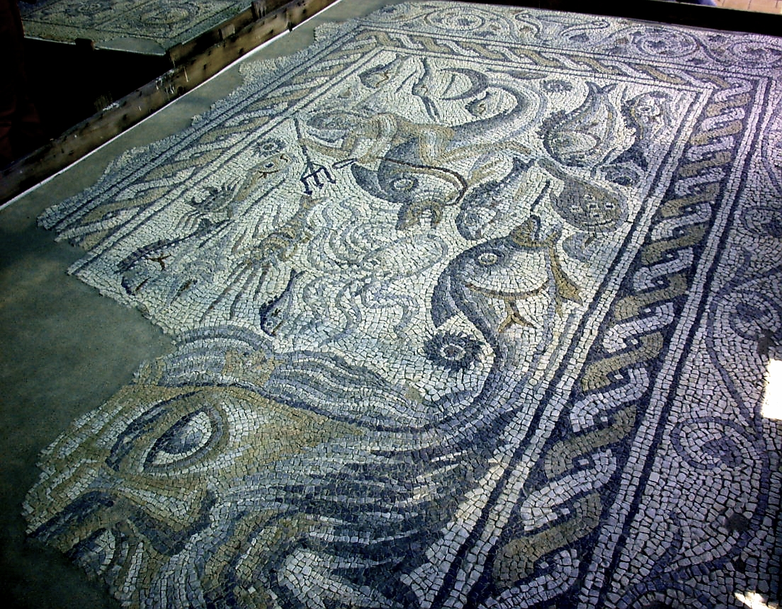 Mosaici Romani presso le rovine di Luni. Foto scattata il 26 maggio 2006